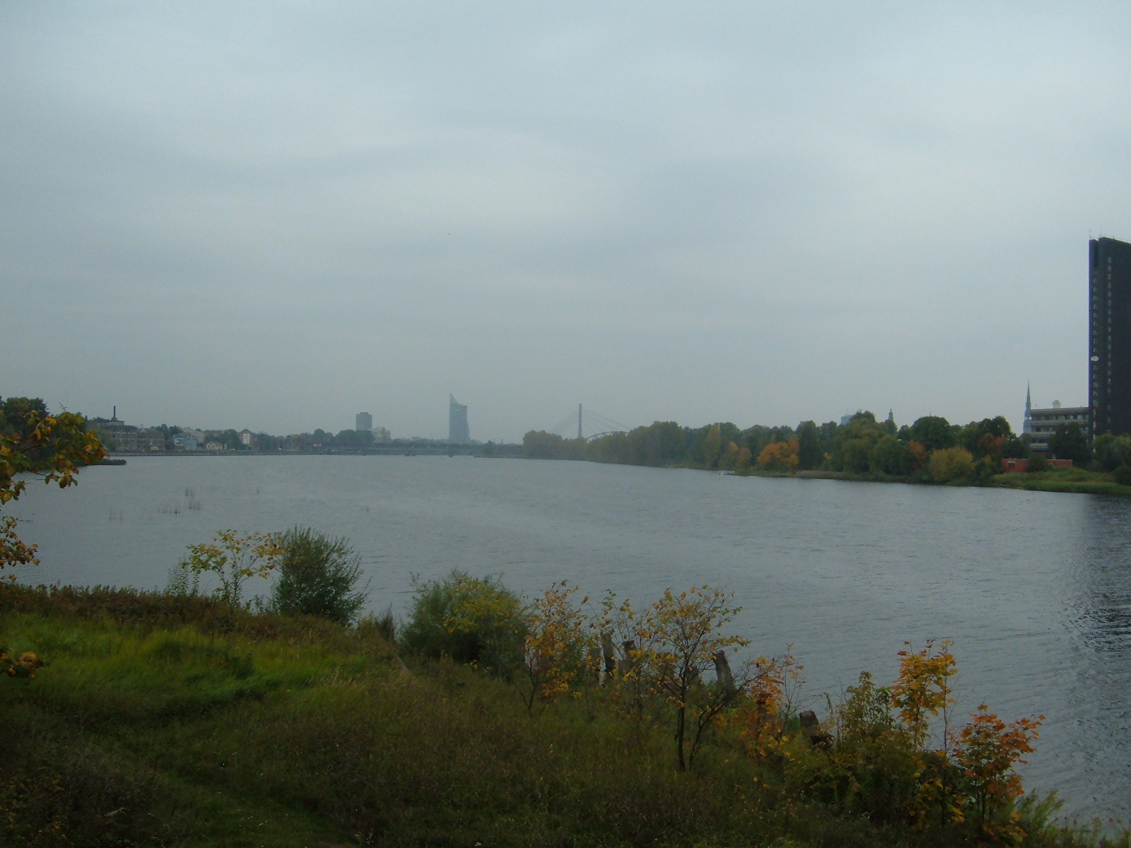 Daugava view from Lucavsala